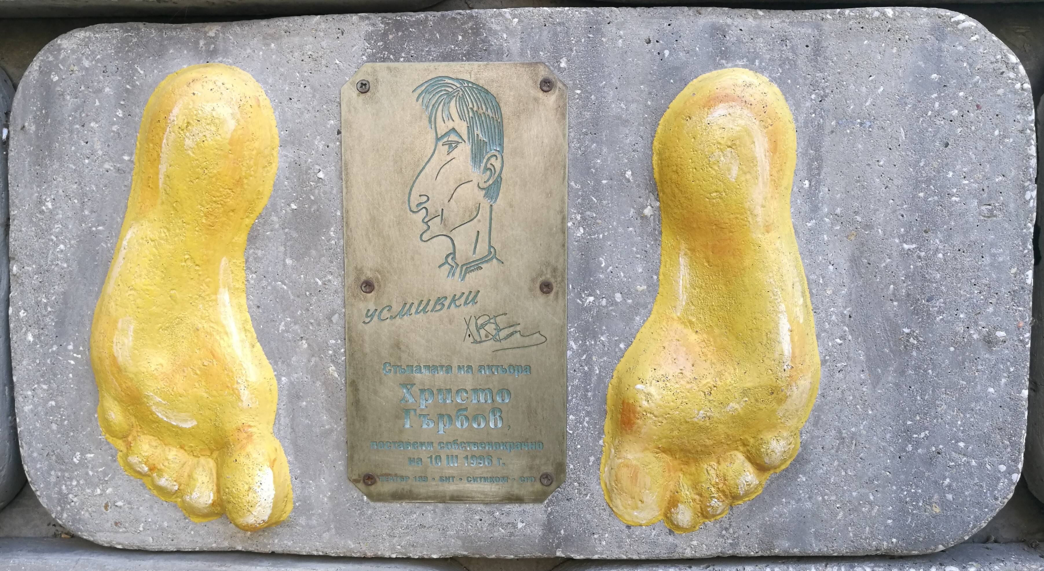 Стената на славата пред Театър 199 - пано с отпечатъци, послание и шарж на Христо Гърбов.